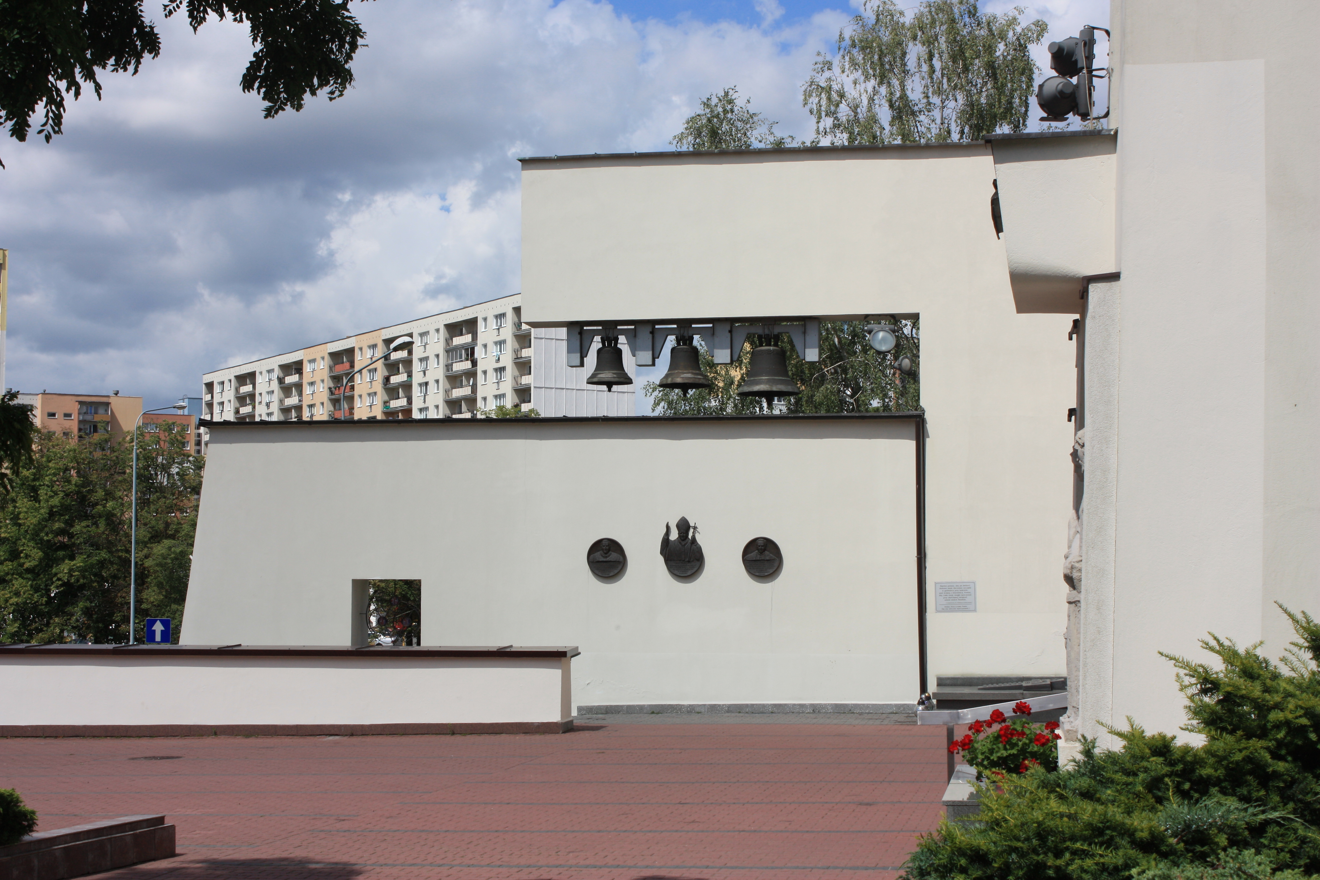 Dzwonnica kościoła Świętej Rodziny w Poznaniu.